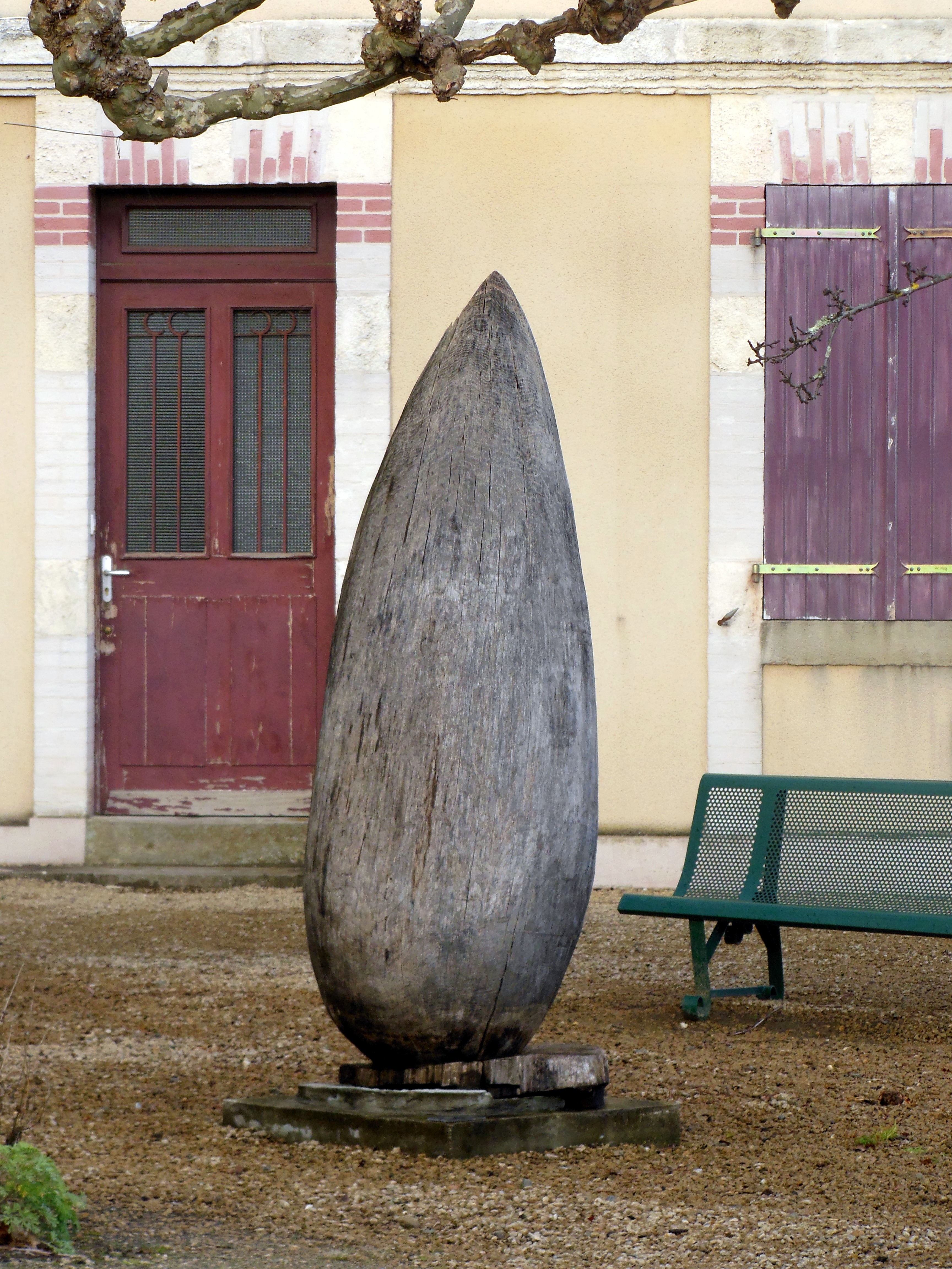 Graine, à Garein (Landes, France)